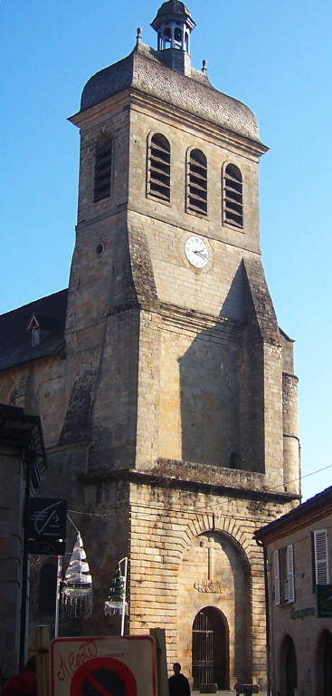 Vue du portail de l'église Saint Sauveur de Figeac dans le Lot